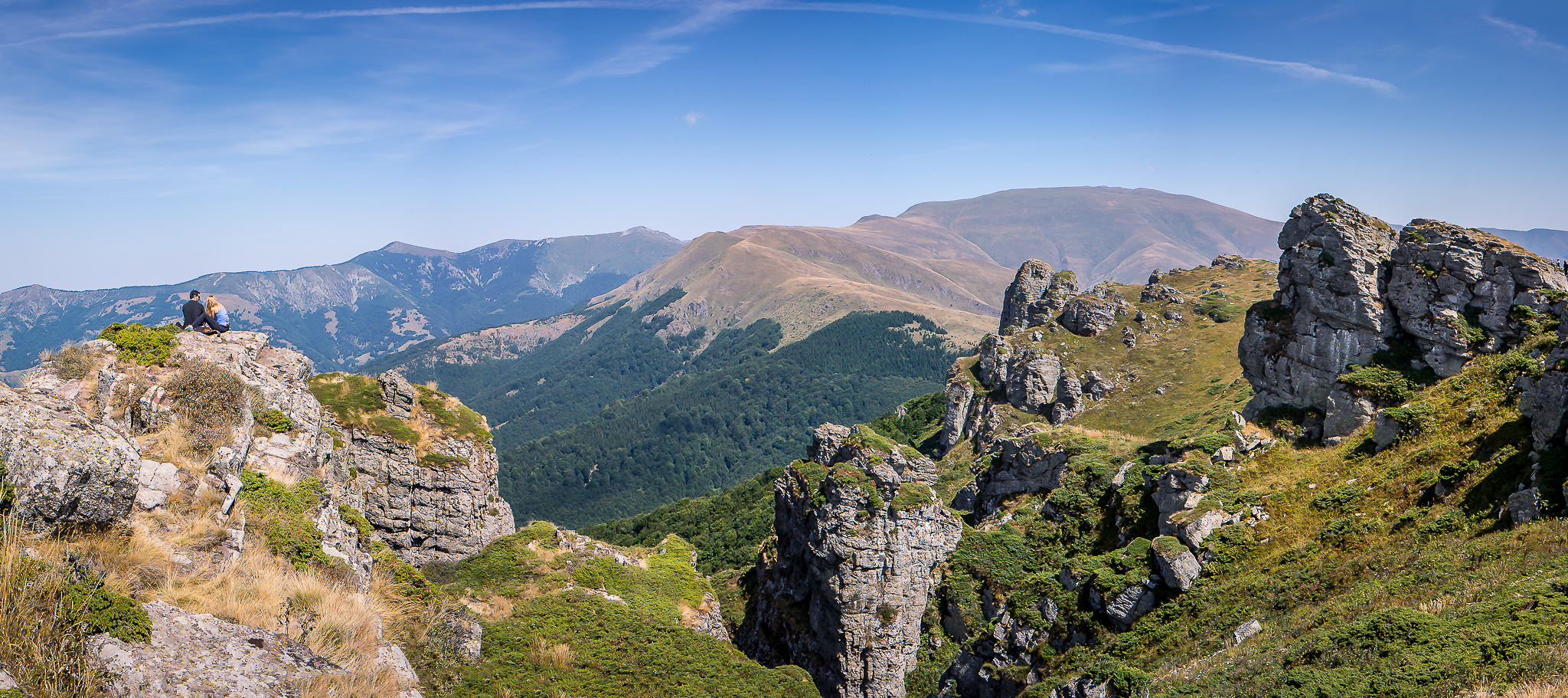 Panoramski pogled sa Babinog Zuba na Midzor Ово је фотографија заштићеног природног добра у Србији под шифром: ПП16This is a a photo of a natural area in Serbia with ID: ПП16